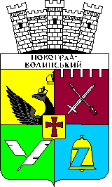 Zvyahel